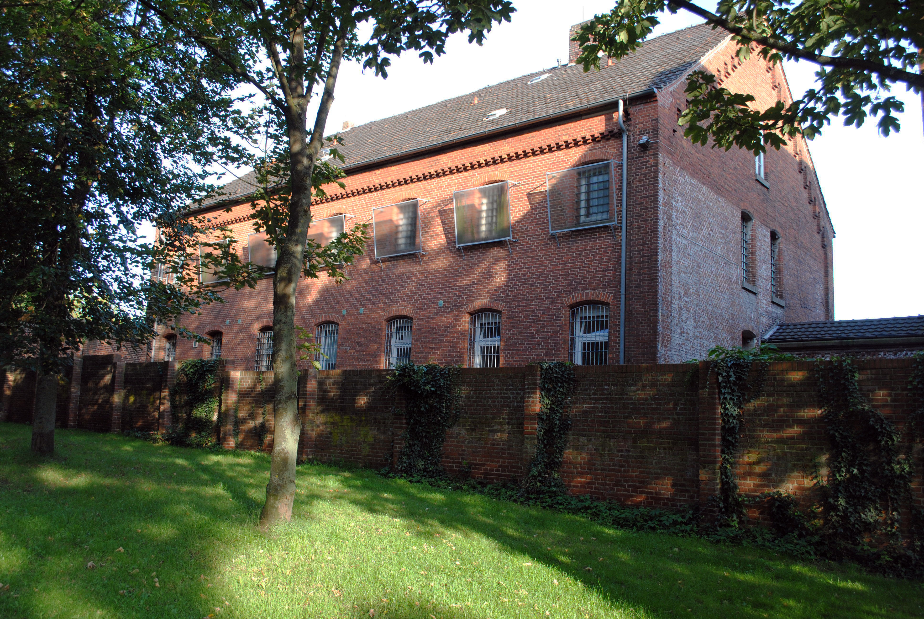 Gefängnis hinter dem Amtsgericht, Westfassade